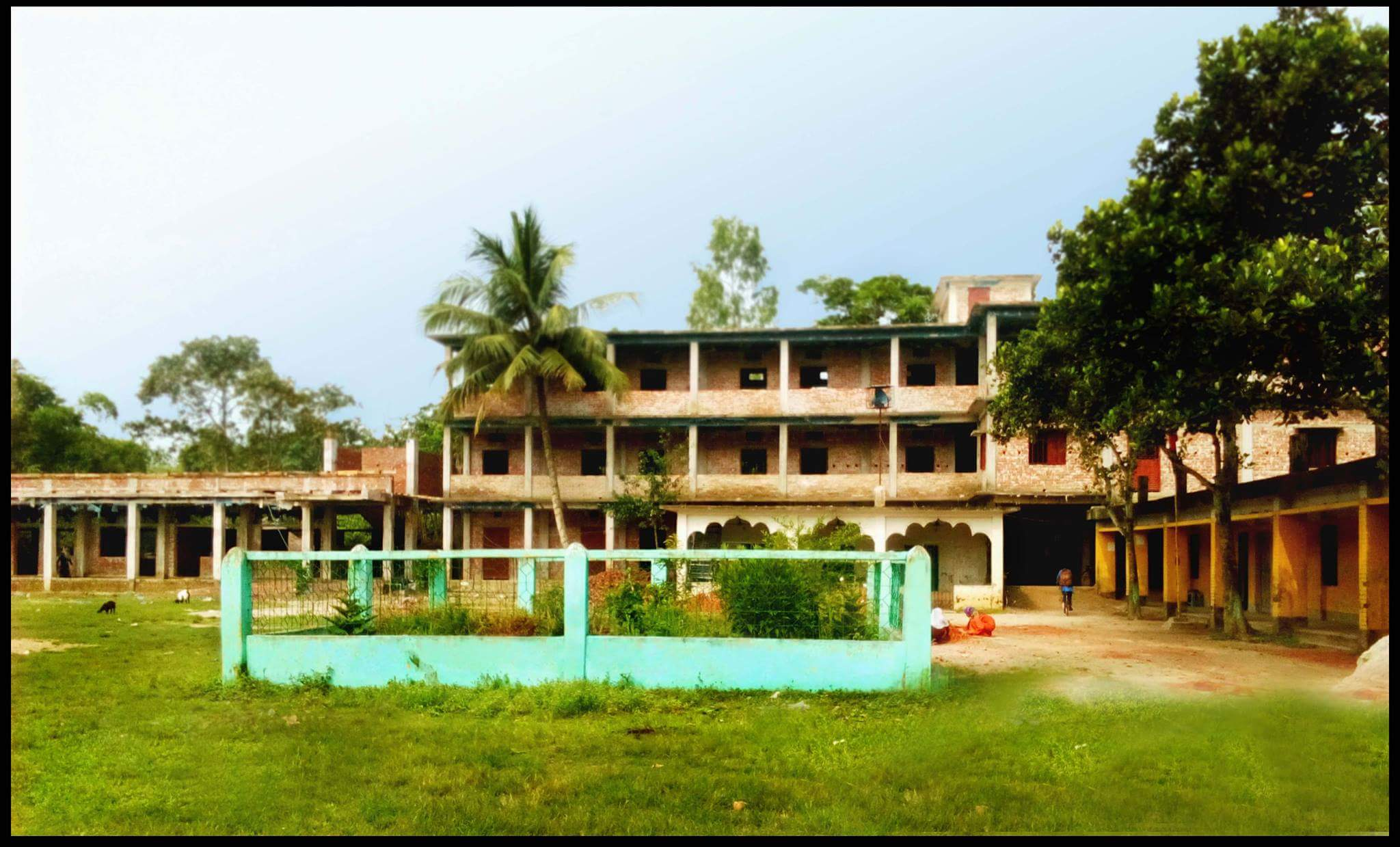 করমজি মজিদিয়া ফাজিল (ডিগ্রী) মাদ্রাসা।